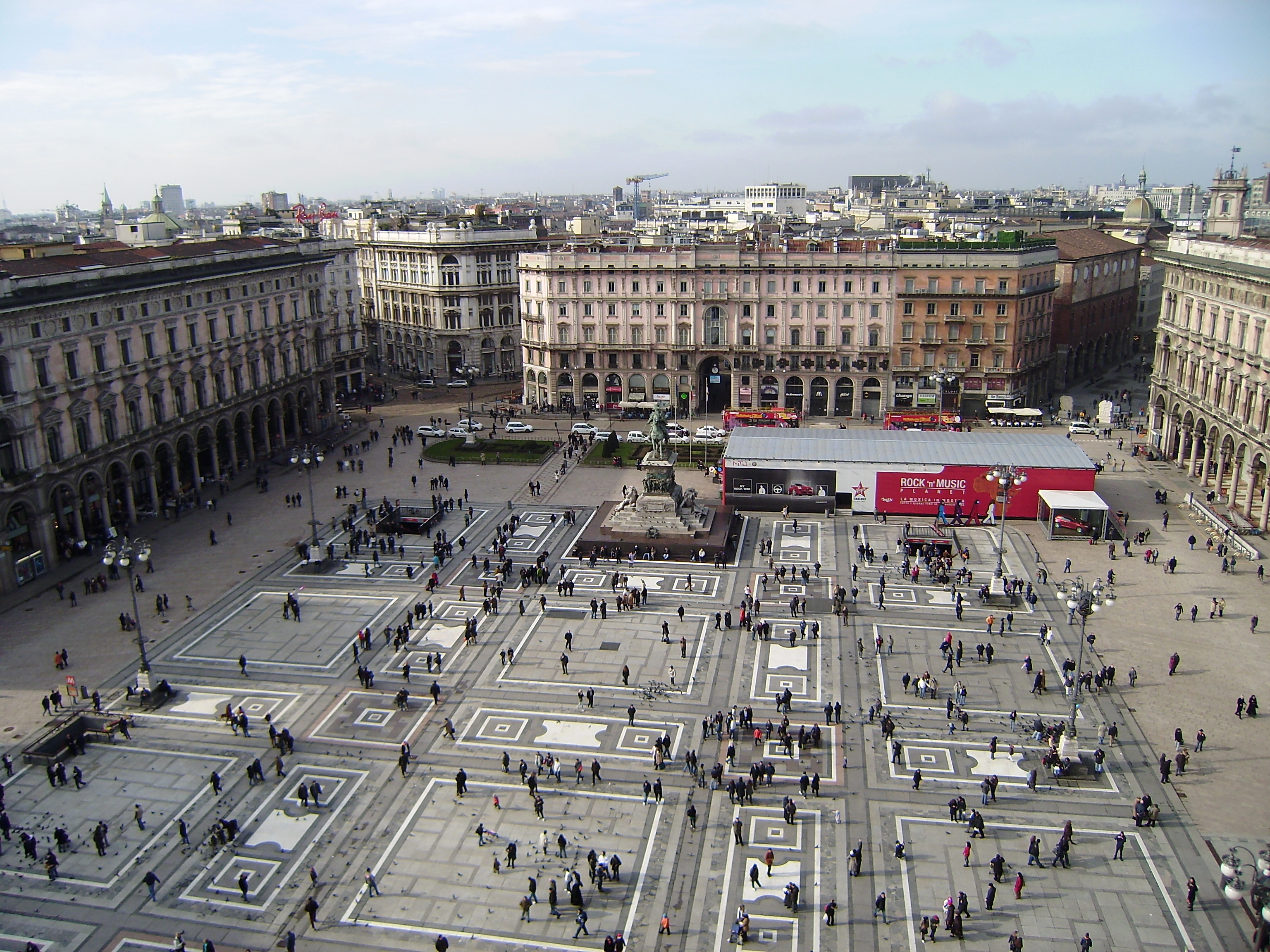 Piazza del Duomo